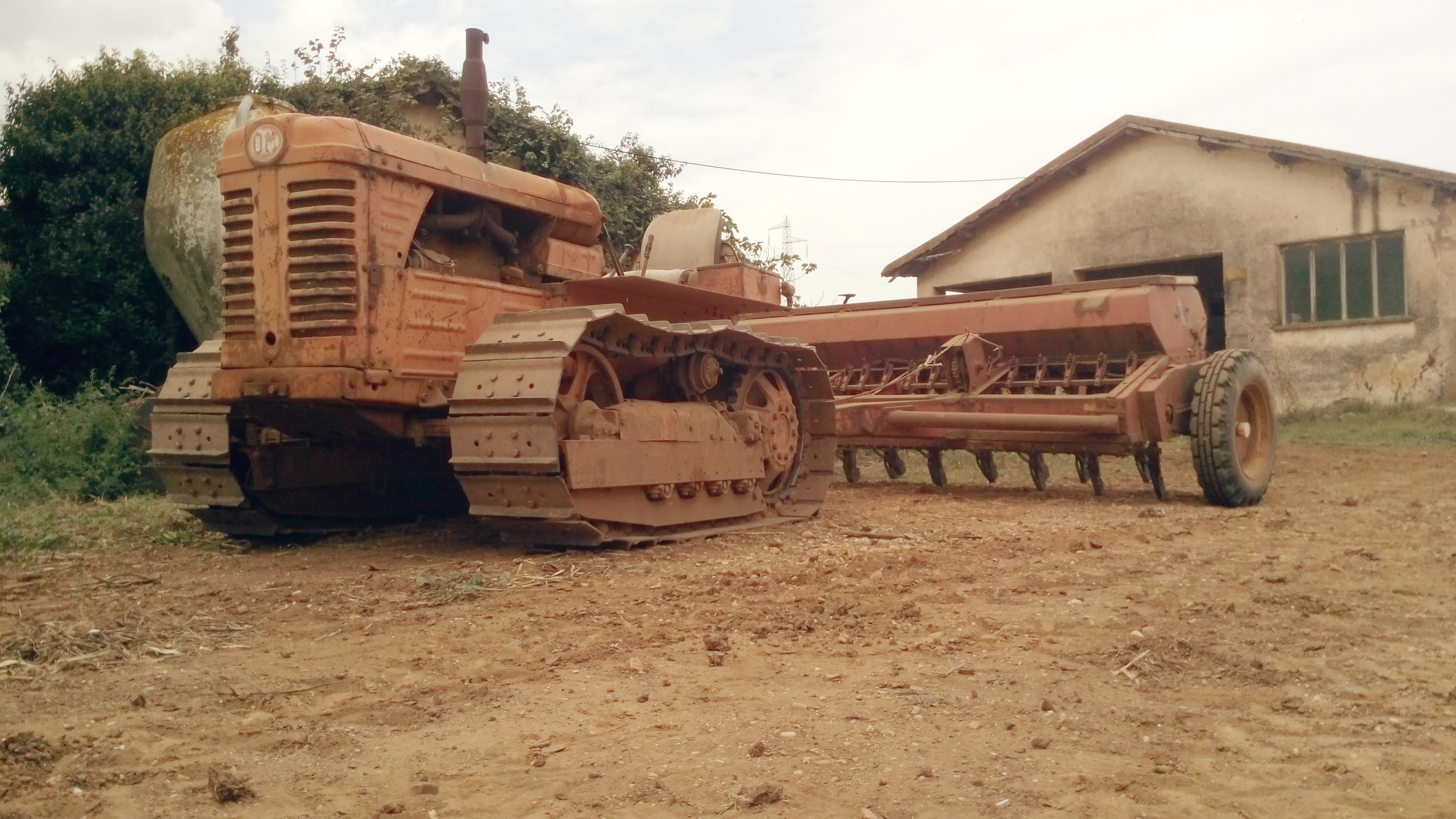 Agricoltura